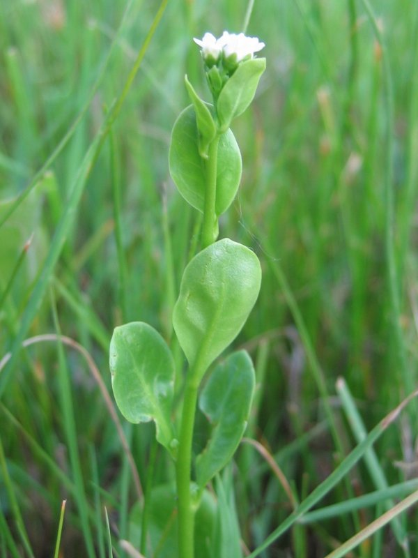 Salzbunge Samolus valerandi, Zingst